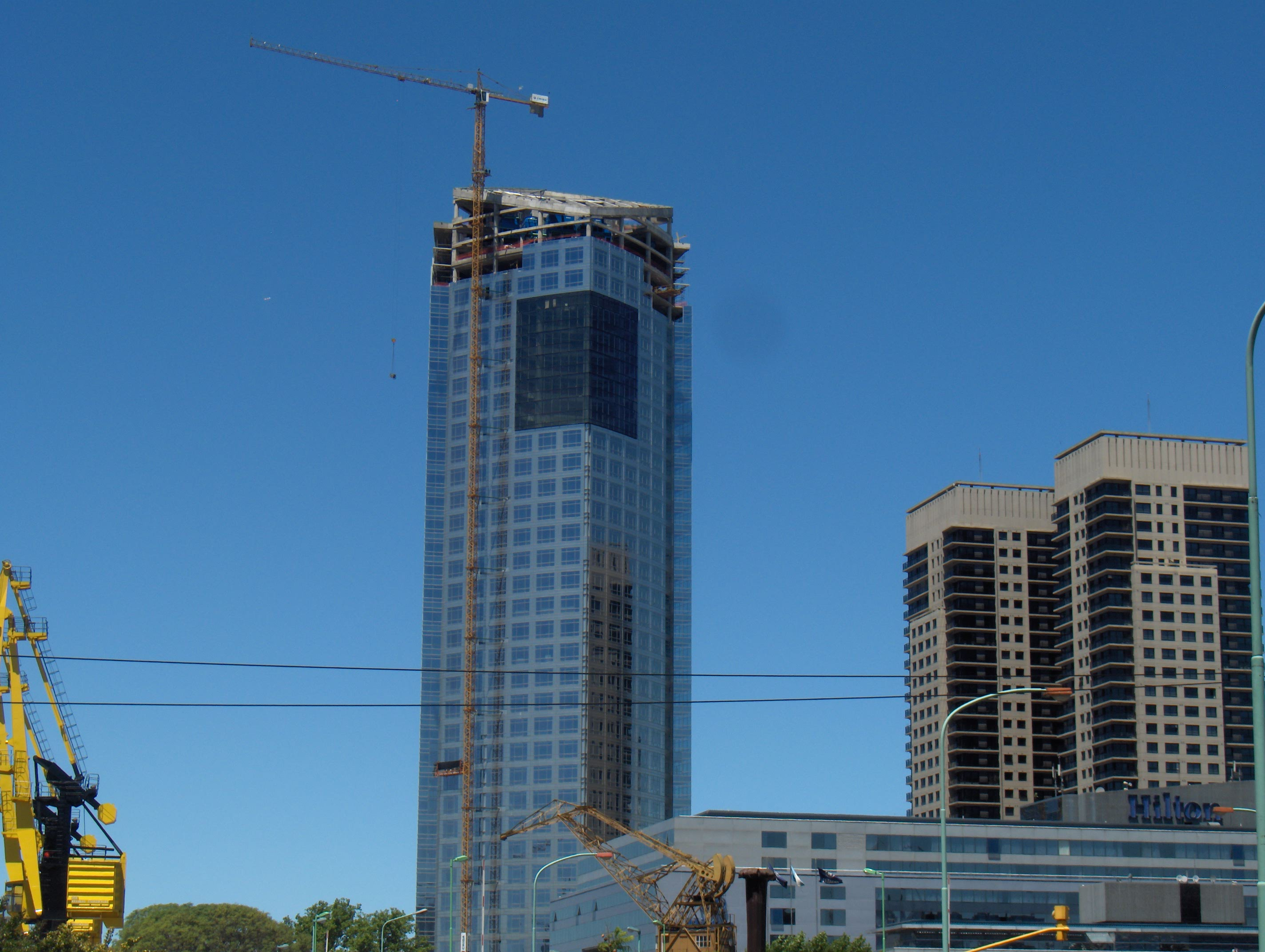 Torre en construcción, actualmente finalizada, ubicada en Puerto Madero, perteneciente a la empresa de hidrocarburos Repsol YPF.